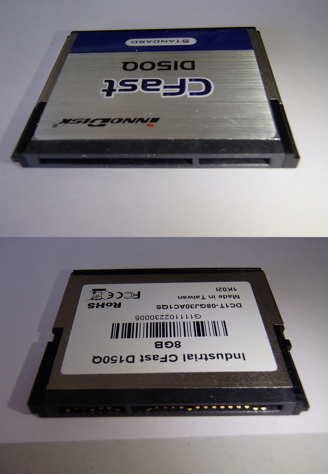 Carte mémoire CFast correspondant aux spécifications 1.0 de CompactFlash Association. Connexion au bus SATA